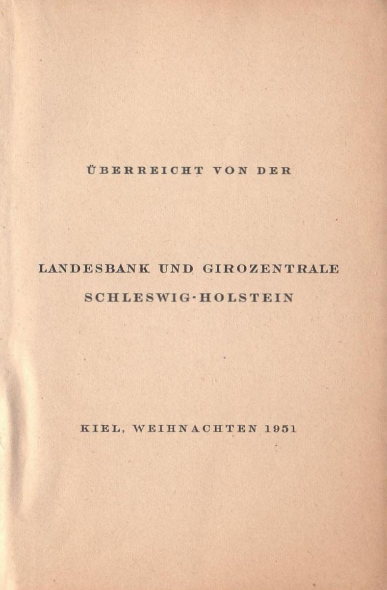 Baedker Schleswig-Holstein 1949 Landesbank Kiel 1951